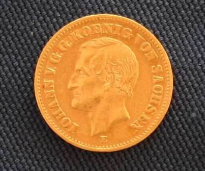 20 Goldmark Johann König von Sachsen